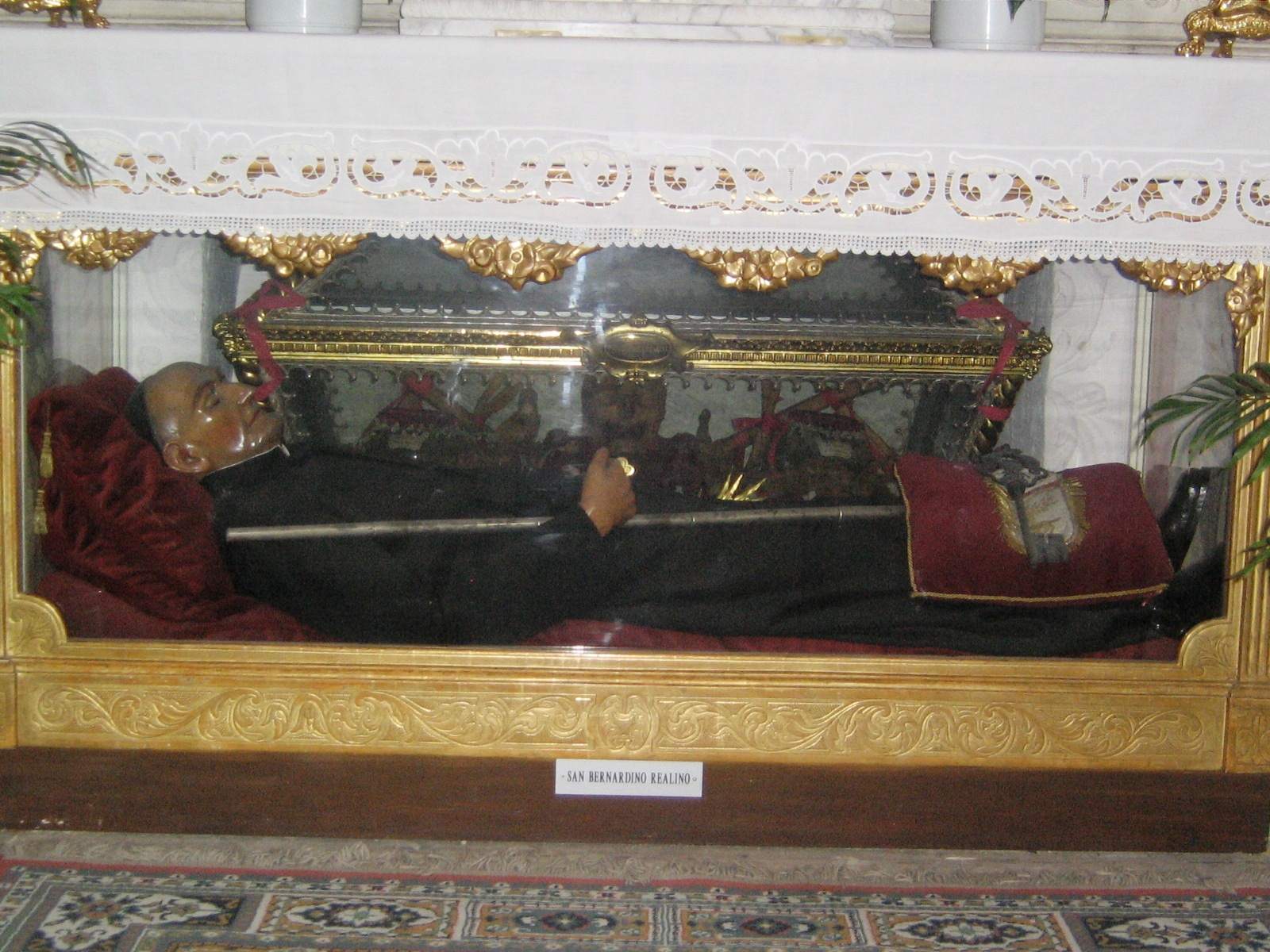 Reliquie di San Bernardino Realino Lecce